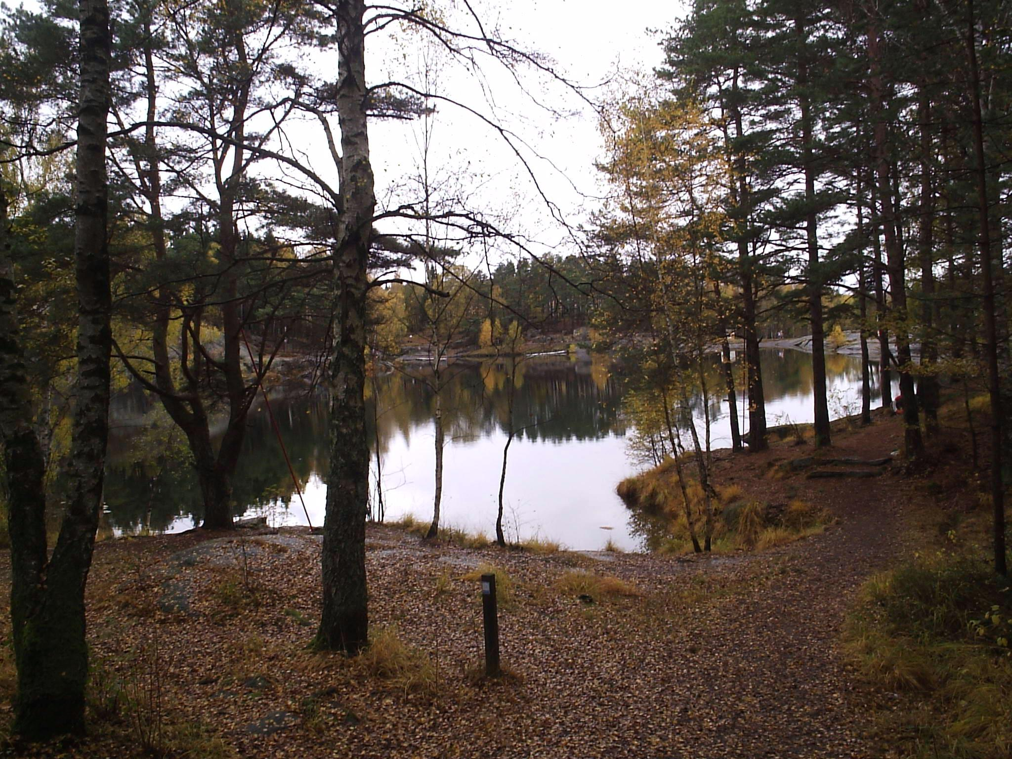 Bergsjön har gett namnet till hela stadsdelen i Göteborg. Bilden är fotograferad av Harri Blomberg, den 23 oktober 2005.